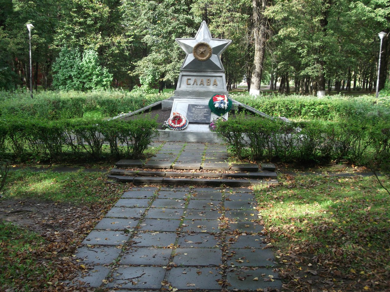 Ленинградская область, Сланцы